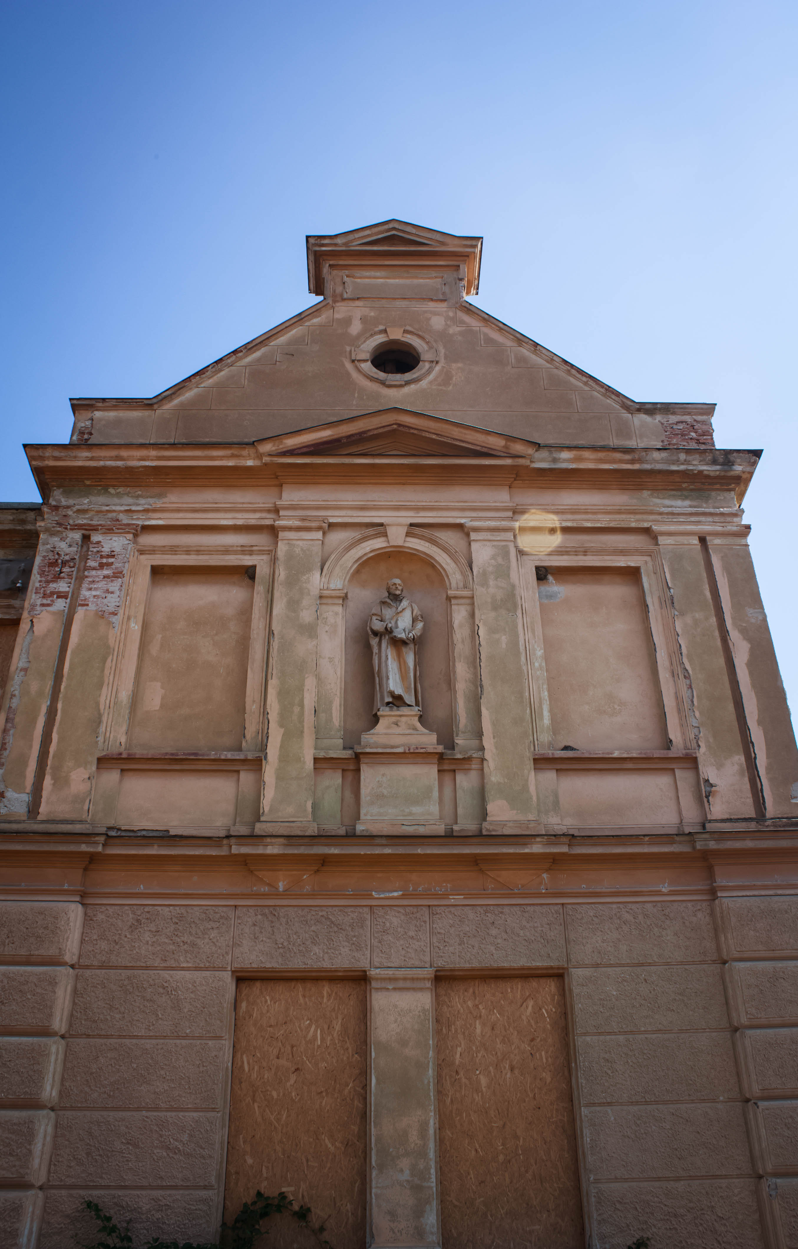 Fosta Școală Germană